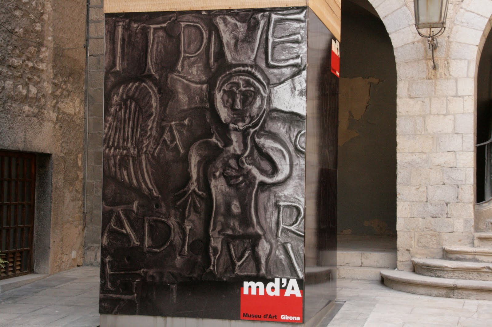 Museu d'Art de Girona